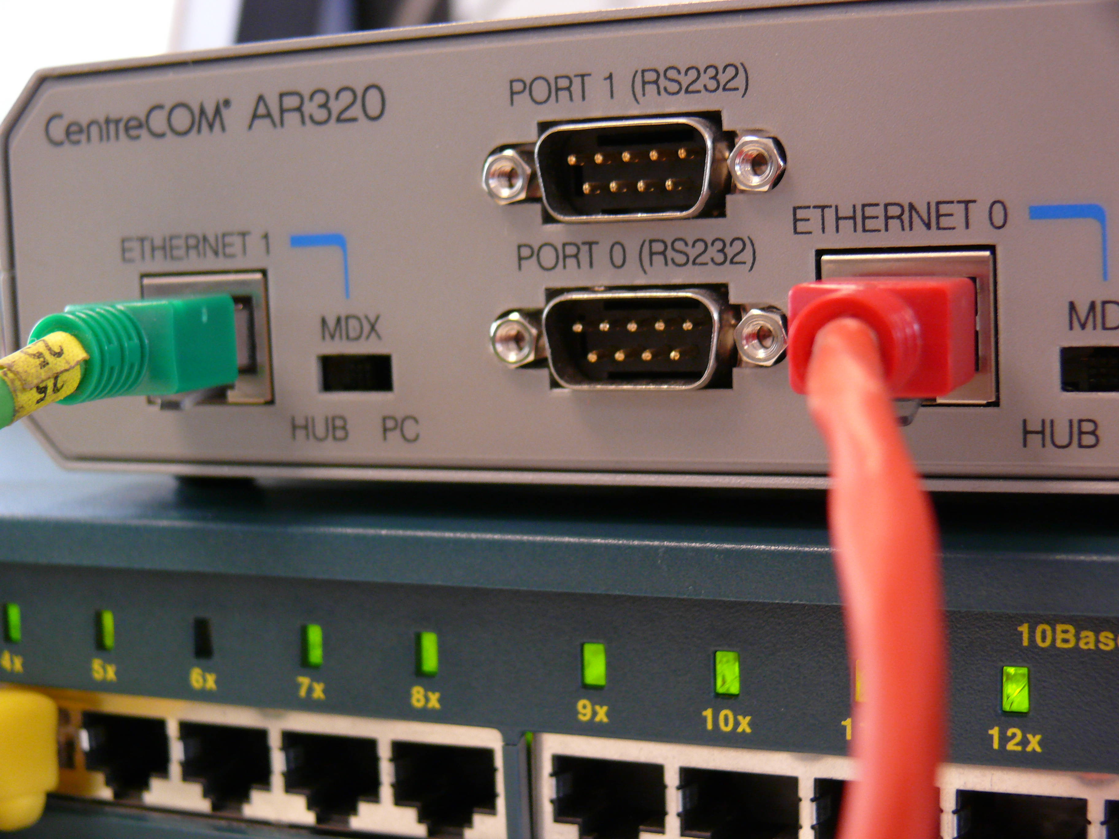 Ethernet Firewall